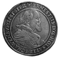 Ernestus von Holstein-Schauenburg auf Taler von 1614